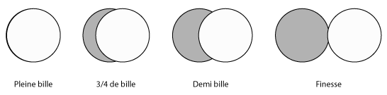 Billard - Quantité de bille - Travail personnel, libre de droit